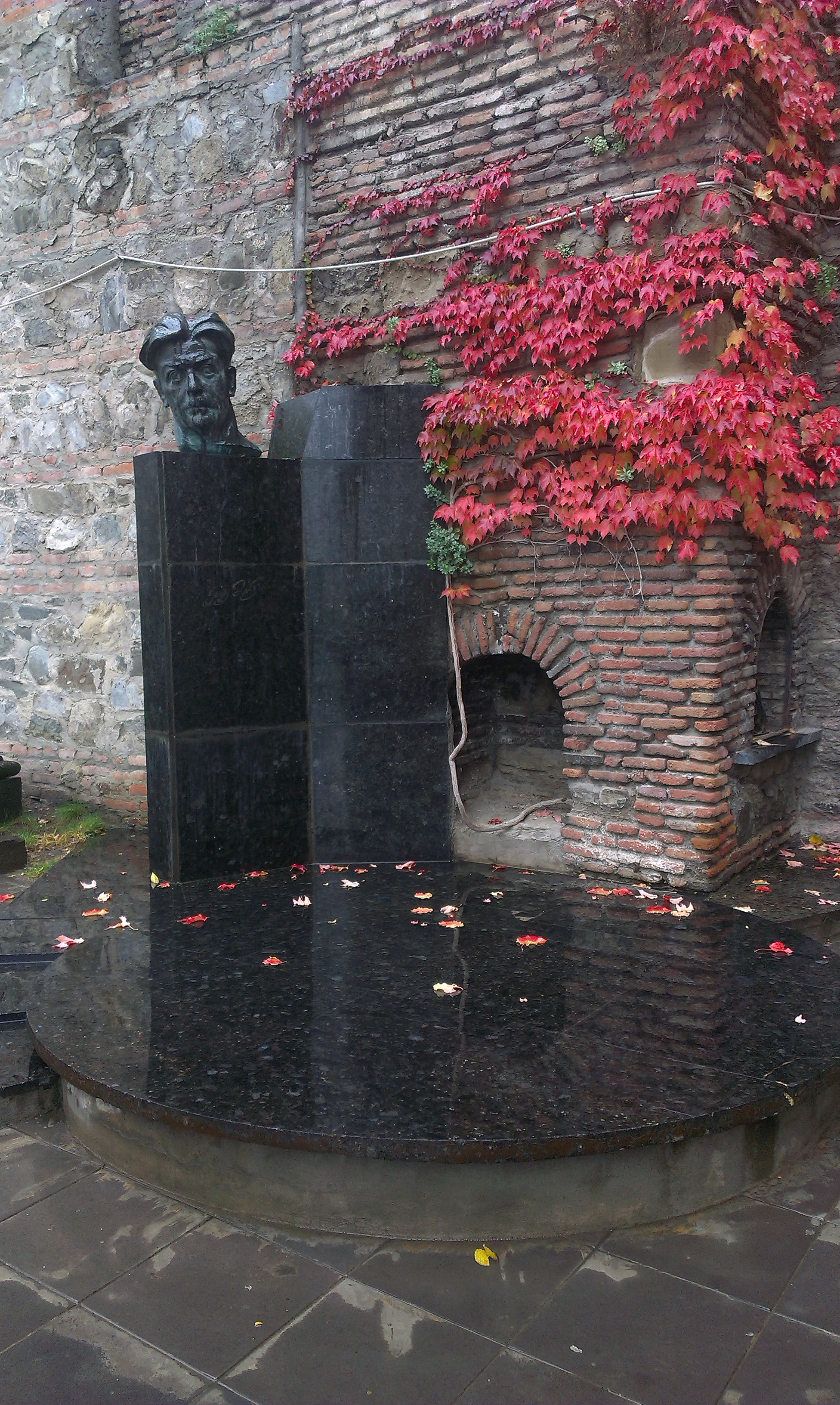 Пантеон Мтацминда